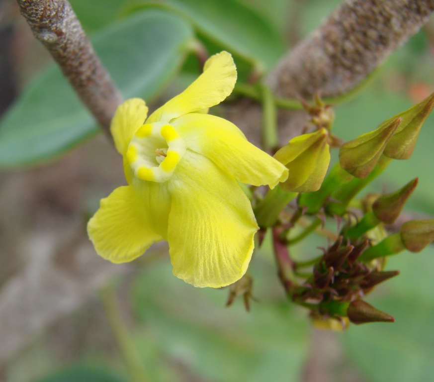 Prestonia coalita - APOCYNACEAE Parque Nacional da Chapada dos Veadeiros - Alto Paraíso de Goiás - Goiás - Brasil